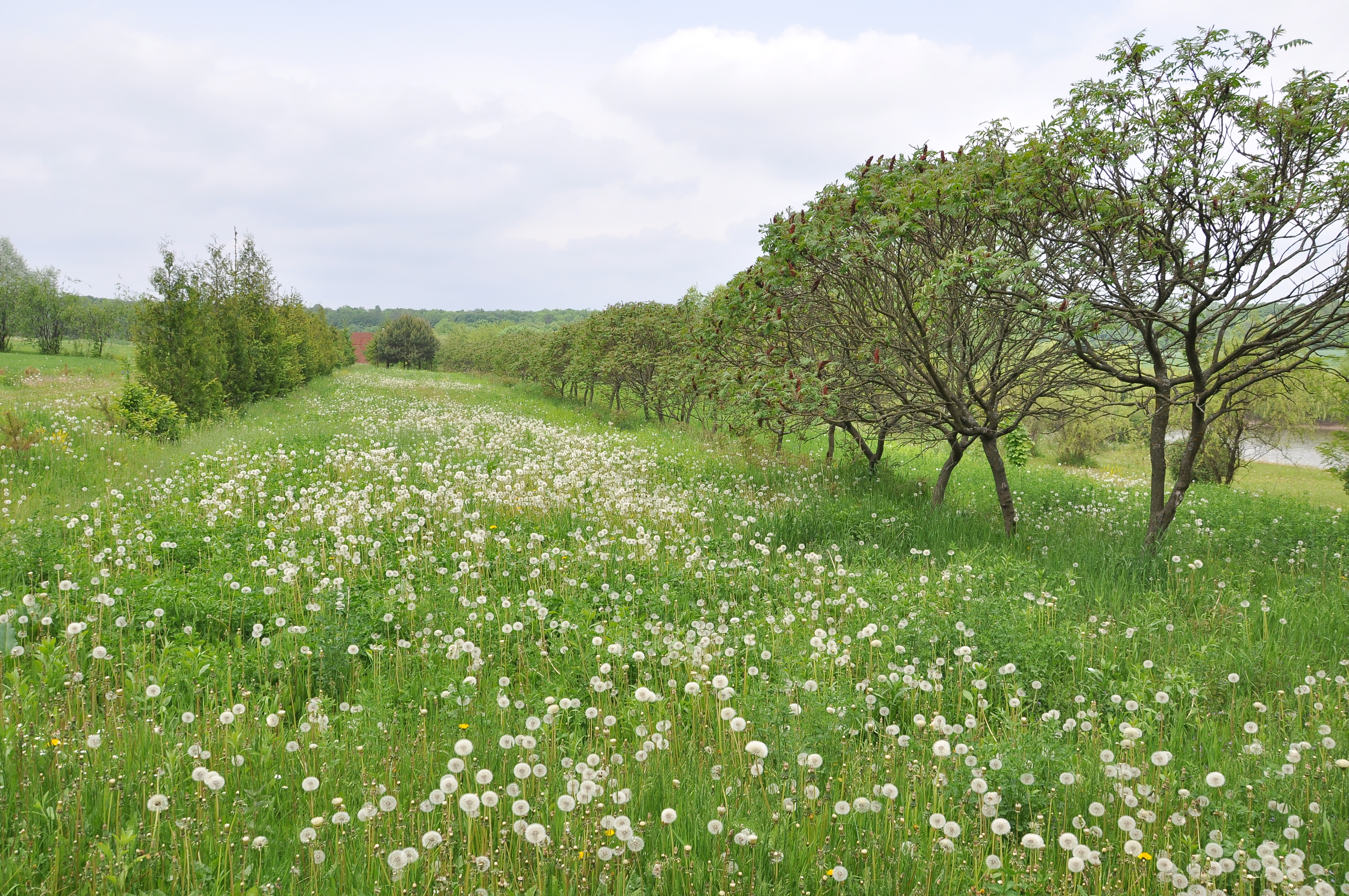 Ботанічний сад «Червона калина» на території навчально-оздоровчого комплексу «Червона калина» Тернопільського державного медичного університету поблизу смт Дружба та с. Лошнів Теребовлянського району.